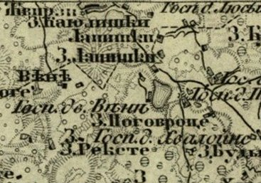 Озёра Мядайнис и Вяню. Фрагмент карты работы Ф. Ф. Шуберта. Из комплекта топографических карт Ковенской губернии. 1860-1890 гг. Масштаб: 3 версты в дюйме. (1 см-1260м) .(1:126000)